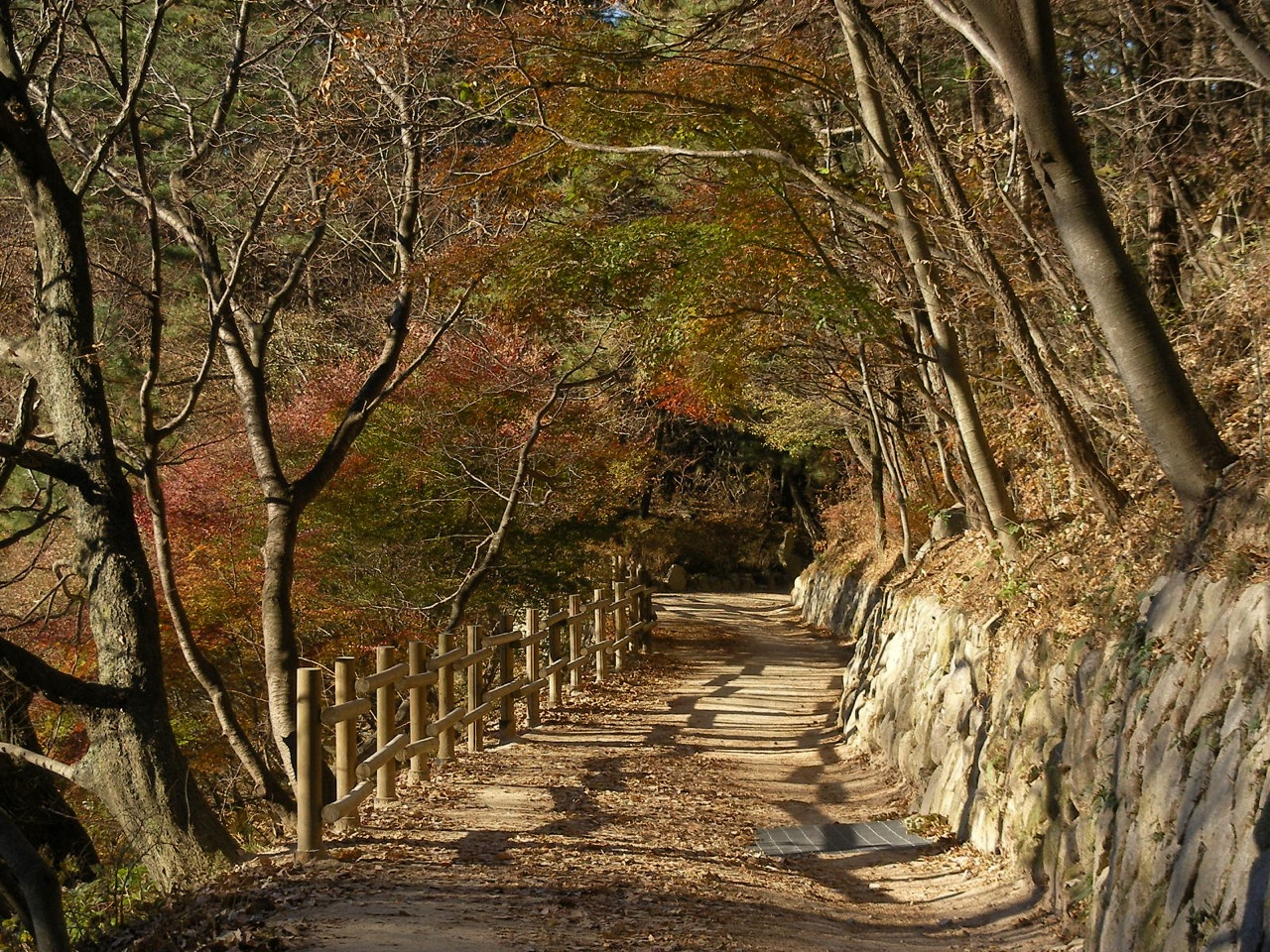 Mountain Path from Seokguram Seokguram (석굴암) to Bulguksa (불국사)